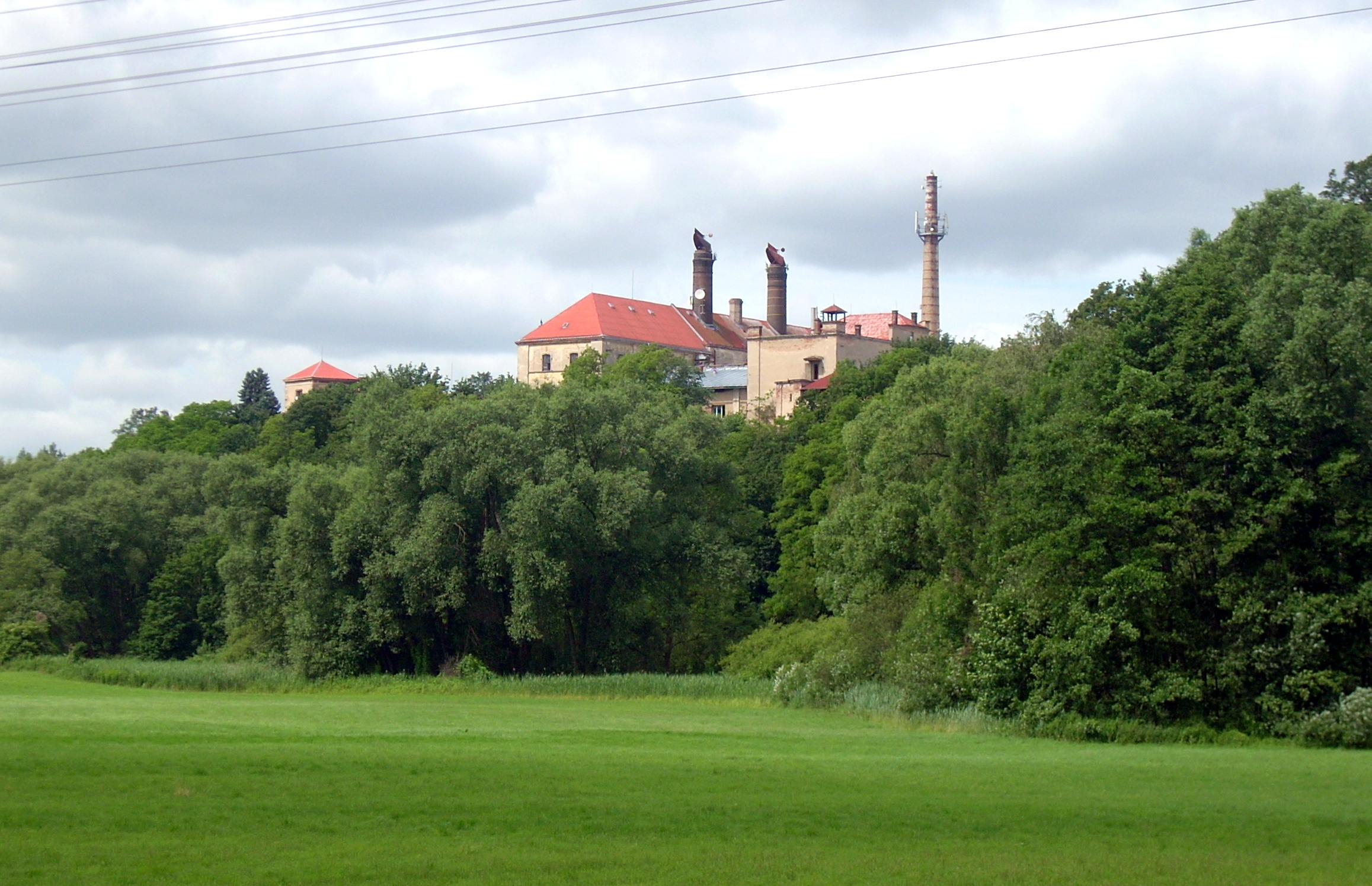 Klášter (Klášter Hradiště nad Jizerou), V část vsi 16, Klášter Hradiště nad Jizerou